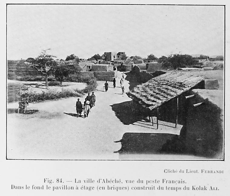 La ville d'Abéché, vue du poste Français. Dans le fond le pavillon à étage (en briques) construit du temps du Kolak Ali. From L'Afrique Équatoriale Française: le pays, les habitants, la colonisation, les pouvoirs publics. Préf. de M. Merlin. Avec 186 reproductions photographiques, 33 diagrammes, profils, et 7 cartes dont 5 en couleurs. (published 1918).